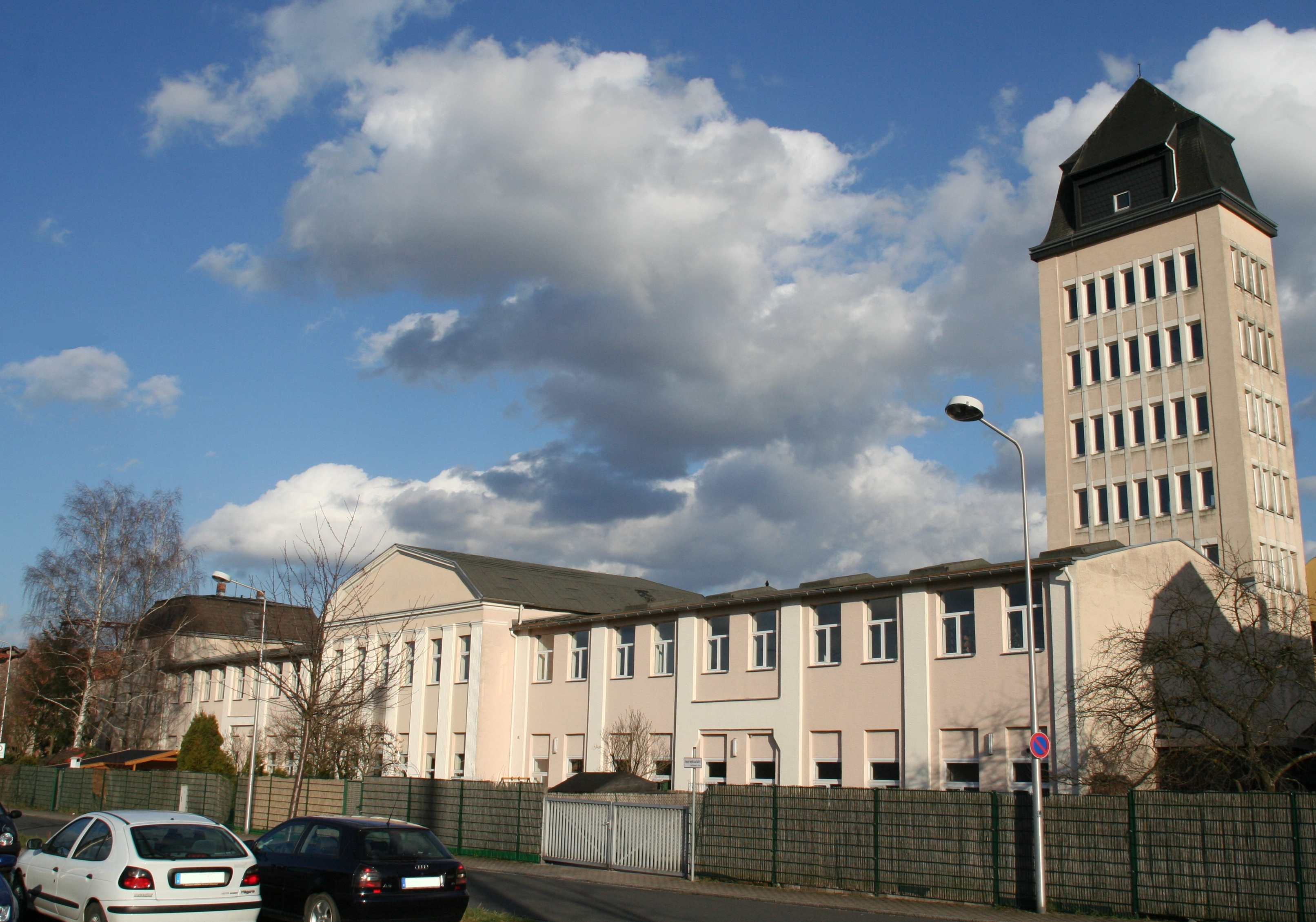 Ehemaliges Werk 2 von Max Oscar Arnold bzw. von Hausser in der Bahnhofstr. in Neustadt bei Coburg